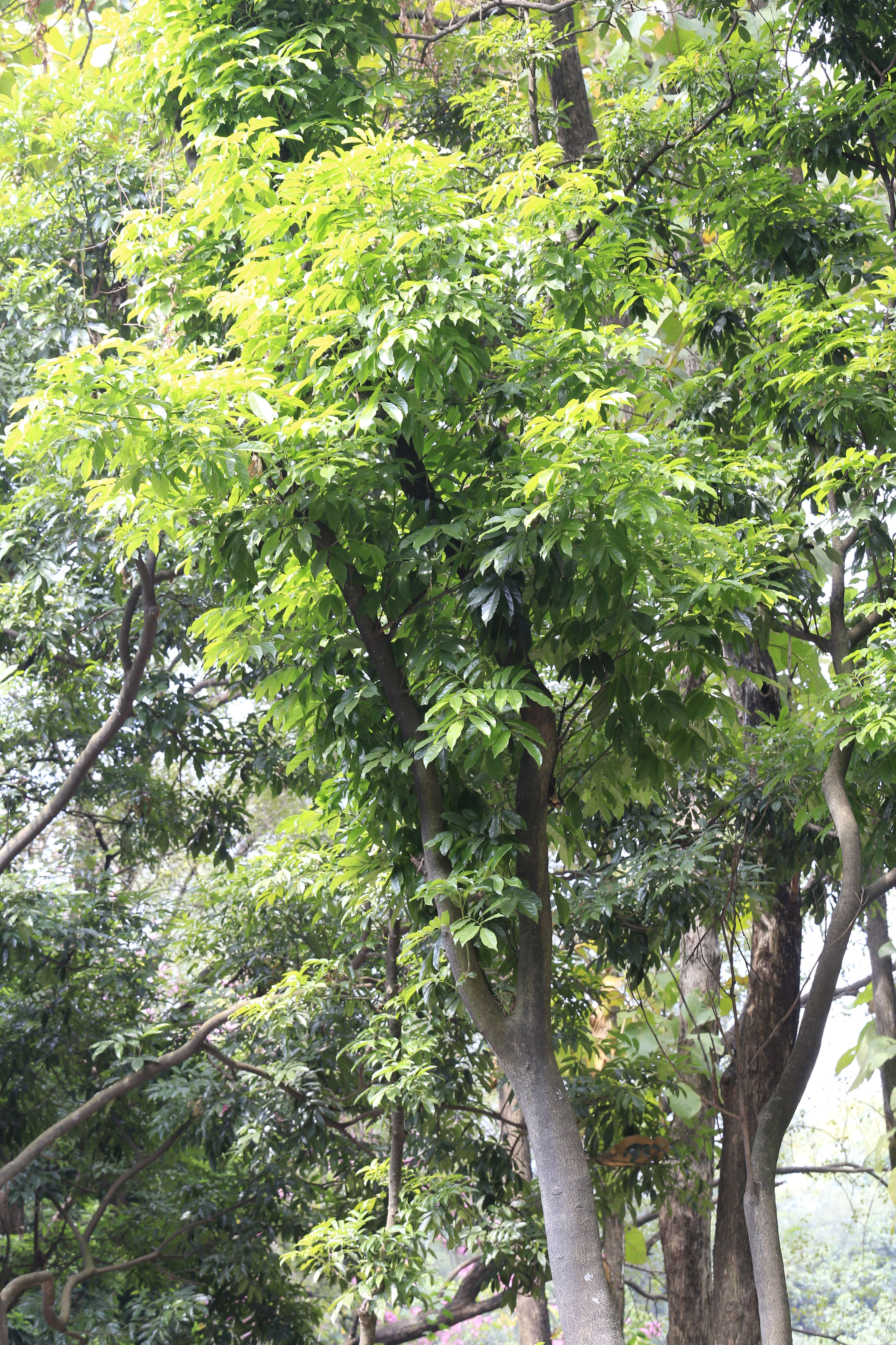 海南红豆（学名：Ormosia pinnata），摄于广州华南植物园